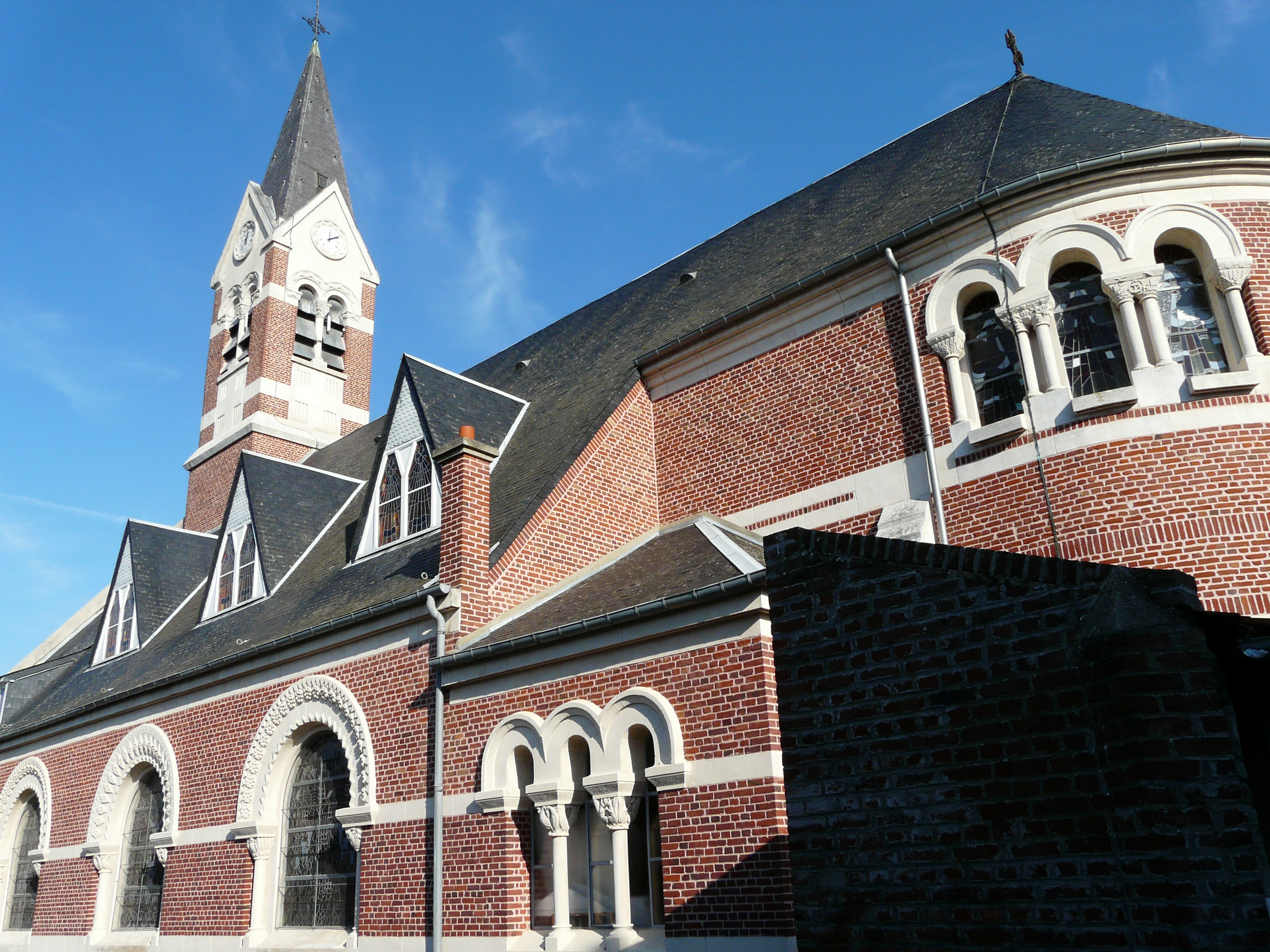 église de Flesquières (Nord, France) : côté droit